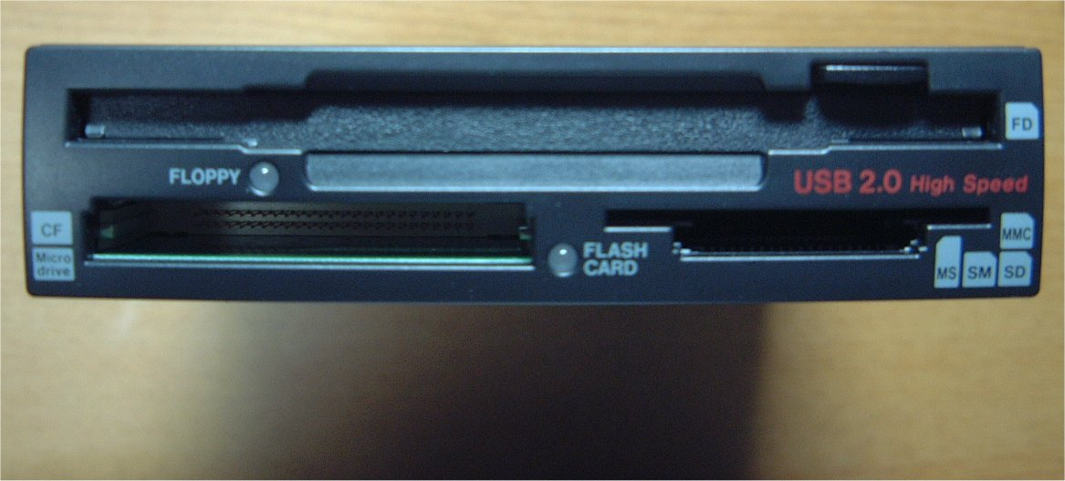 3.5インチフロッピードライブ+カードリーダー